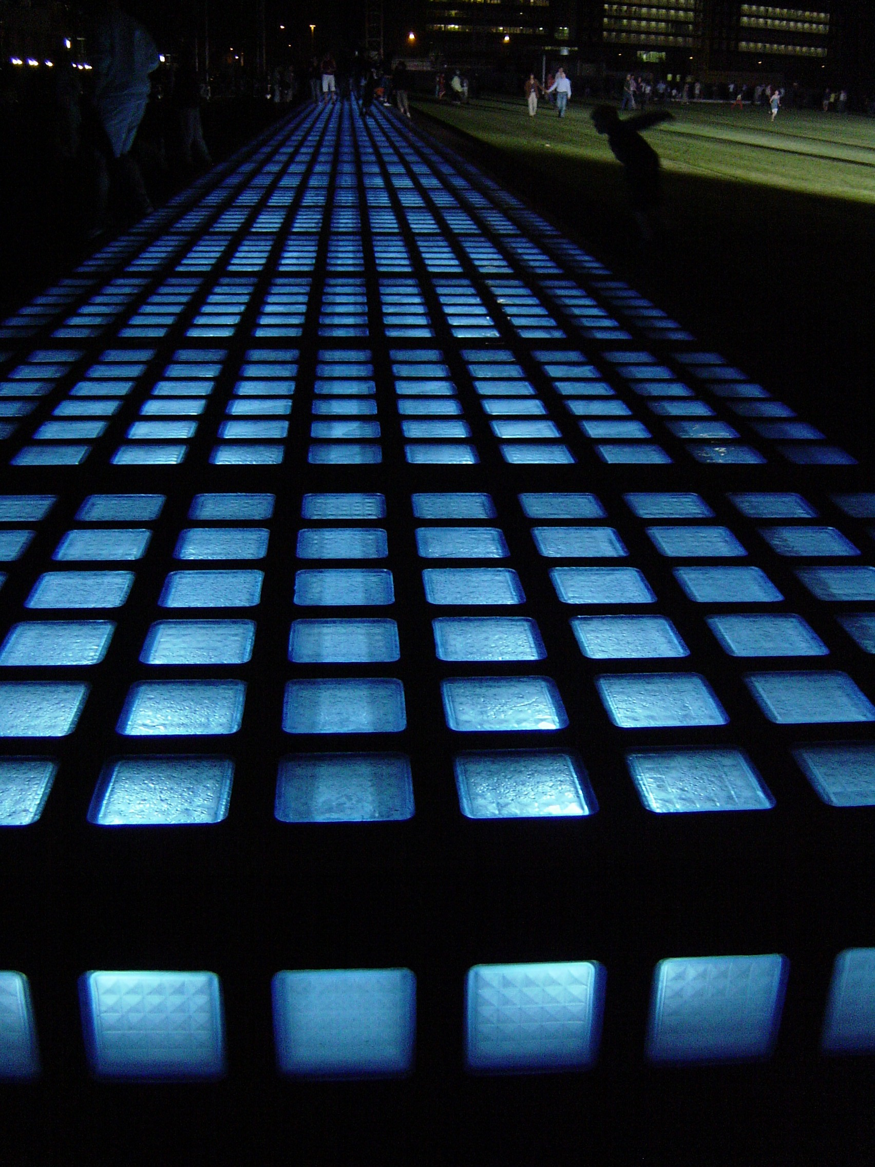 Der 160 Meter lange Balken mit den 7000 blauen Glasbausteinen.